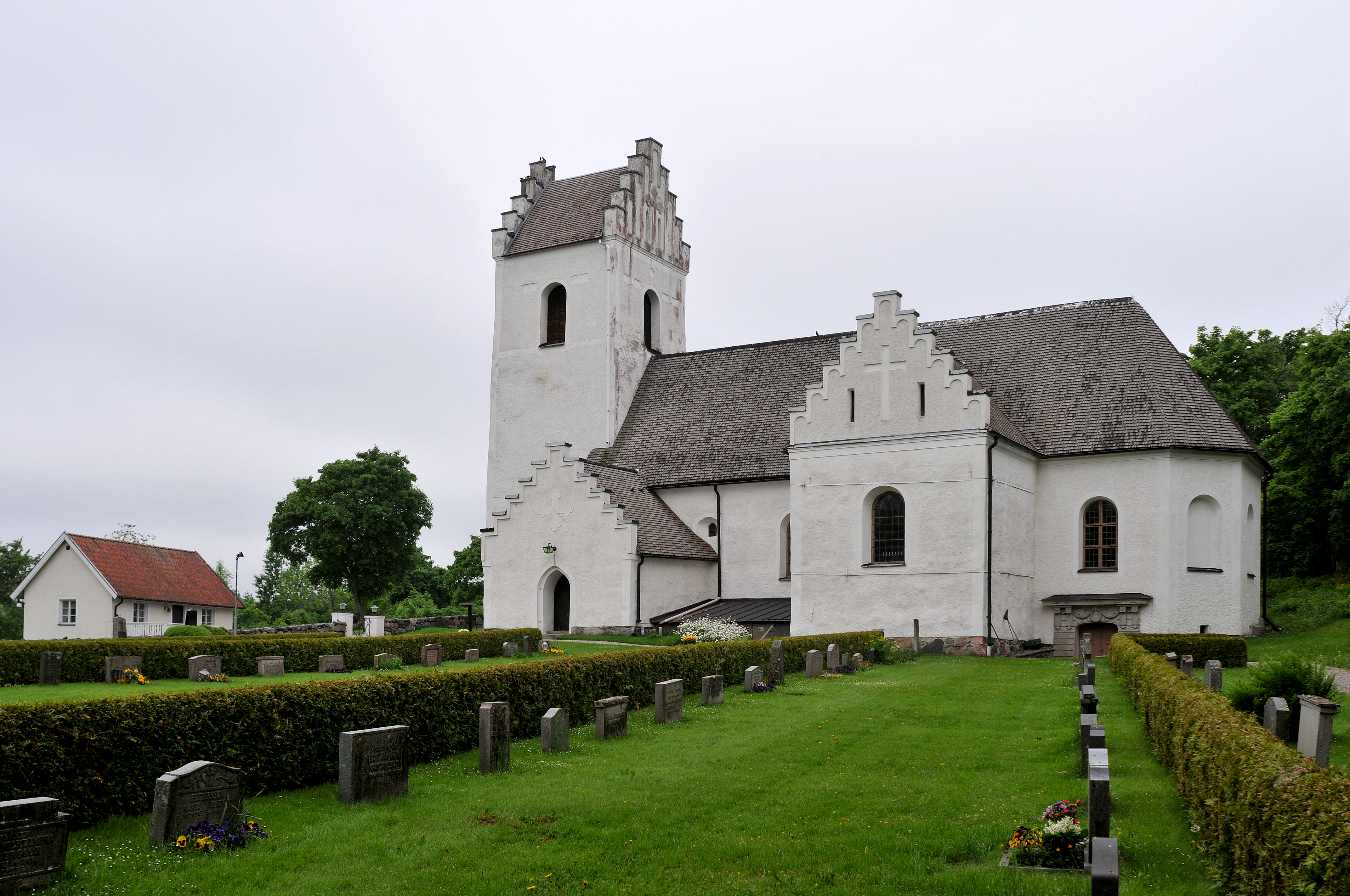 Gillberga kyrka i Eskilstuna kommun. Den är församlingskyrka i Västra Rekarne församling i Strängnäs stift.